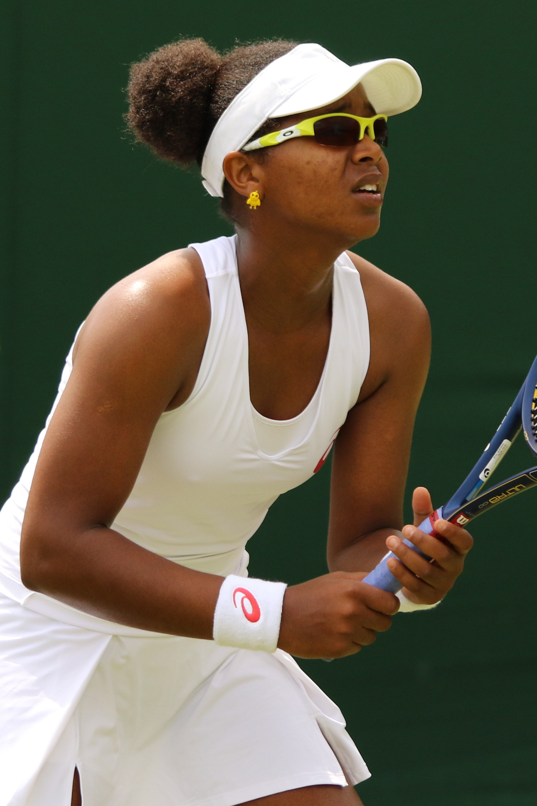 Duval WM16